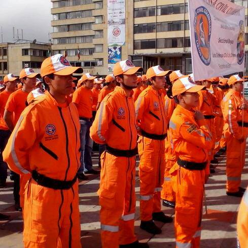 En formacion